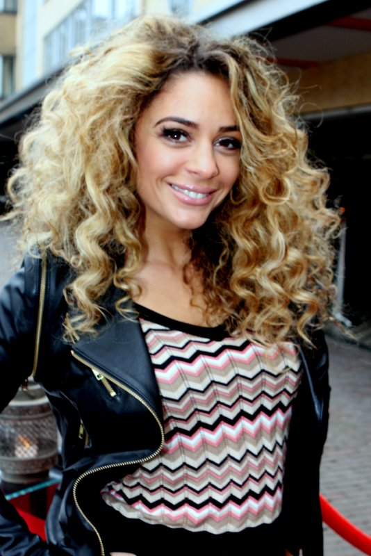 Nederlandse actrice en zangeres